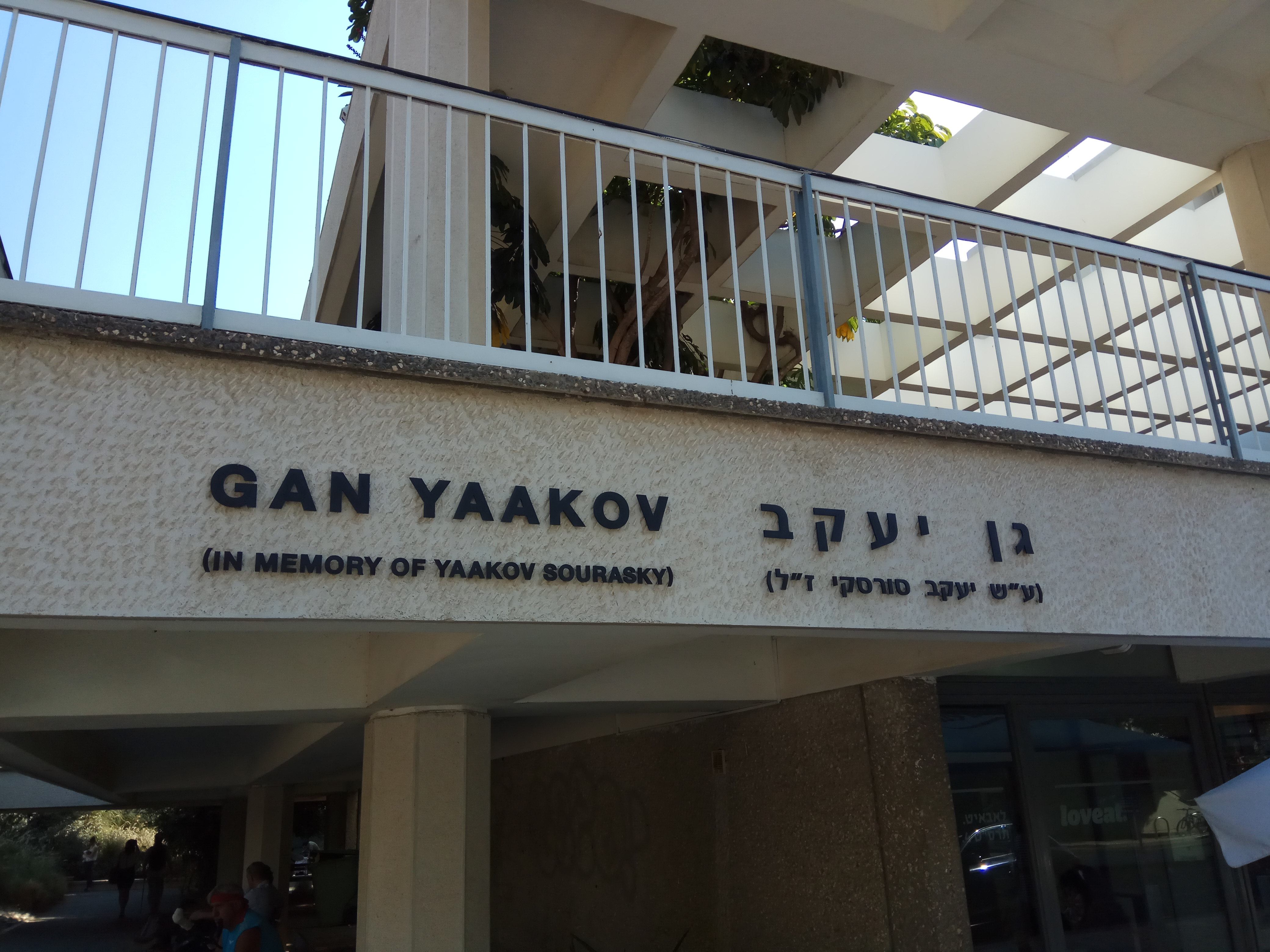 גן יעקב